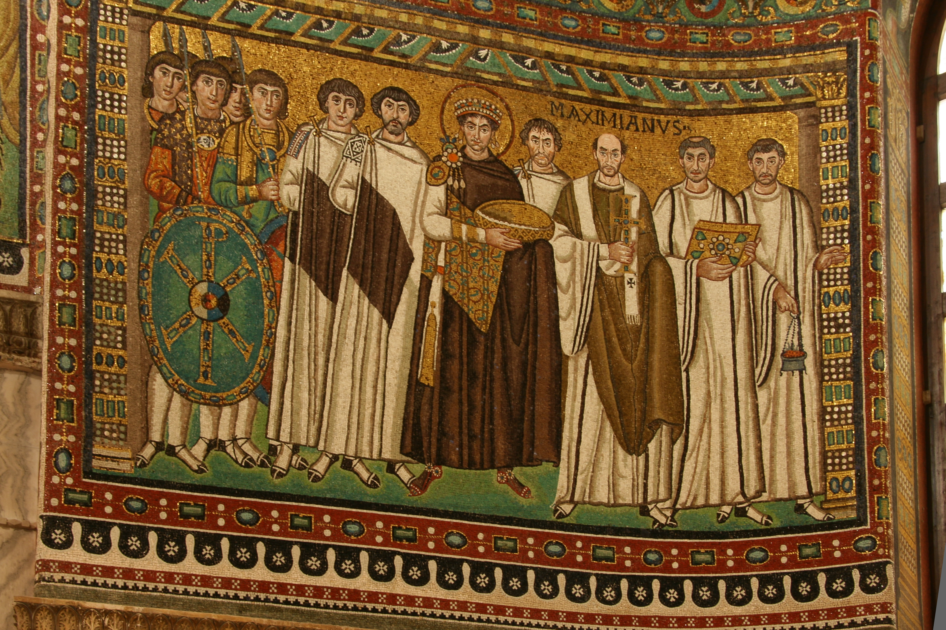 Basilica di San Vitale, Ravenna, particolare del mosaico raffigurante Giustiniano seguito da soldati, funzionari e sacerdoti